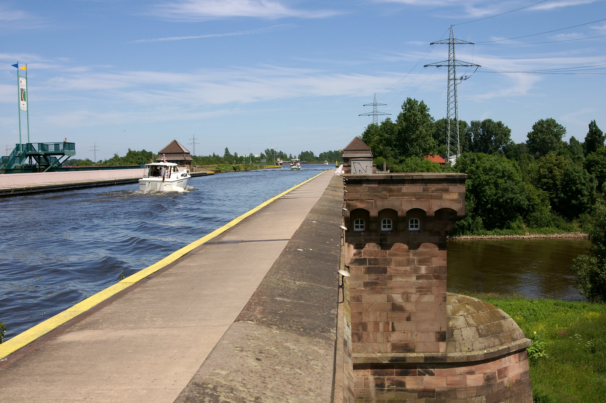 Beim Wasserstraßenkreuz Minden bei Minden überquert der Mittellandkanal die Weser. Links von der hier dargestellten alten Trogbrücke existiert mittlerweile eine neue Brücke für die reguläre Überfahrt. Rechts 30-kV-Freileitung.